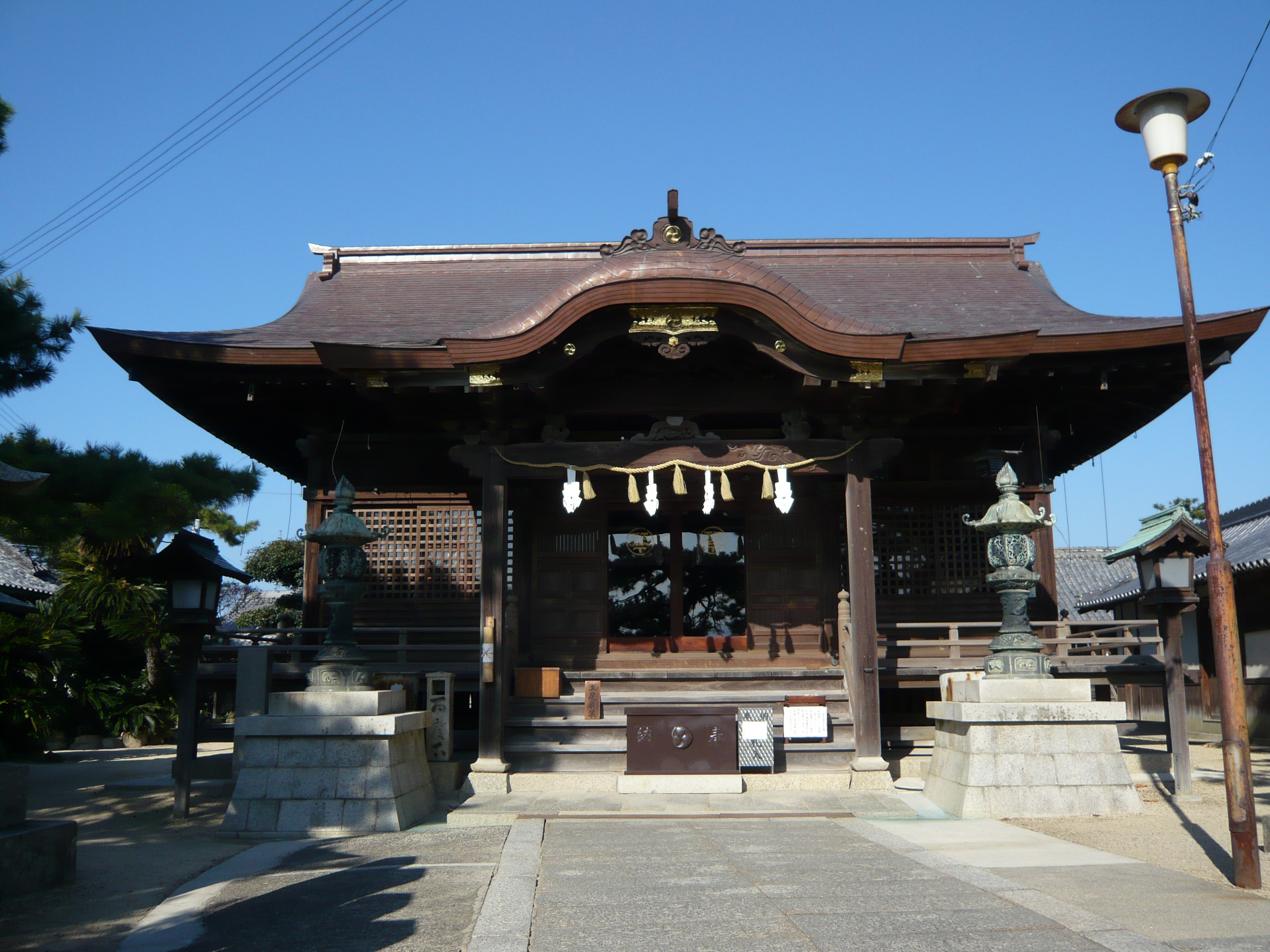 Kotohiki-hachiman-gū, Kan'onji, Kagawa, Japan 琴弾八幡宮（香川県観音寺市）